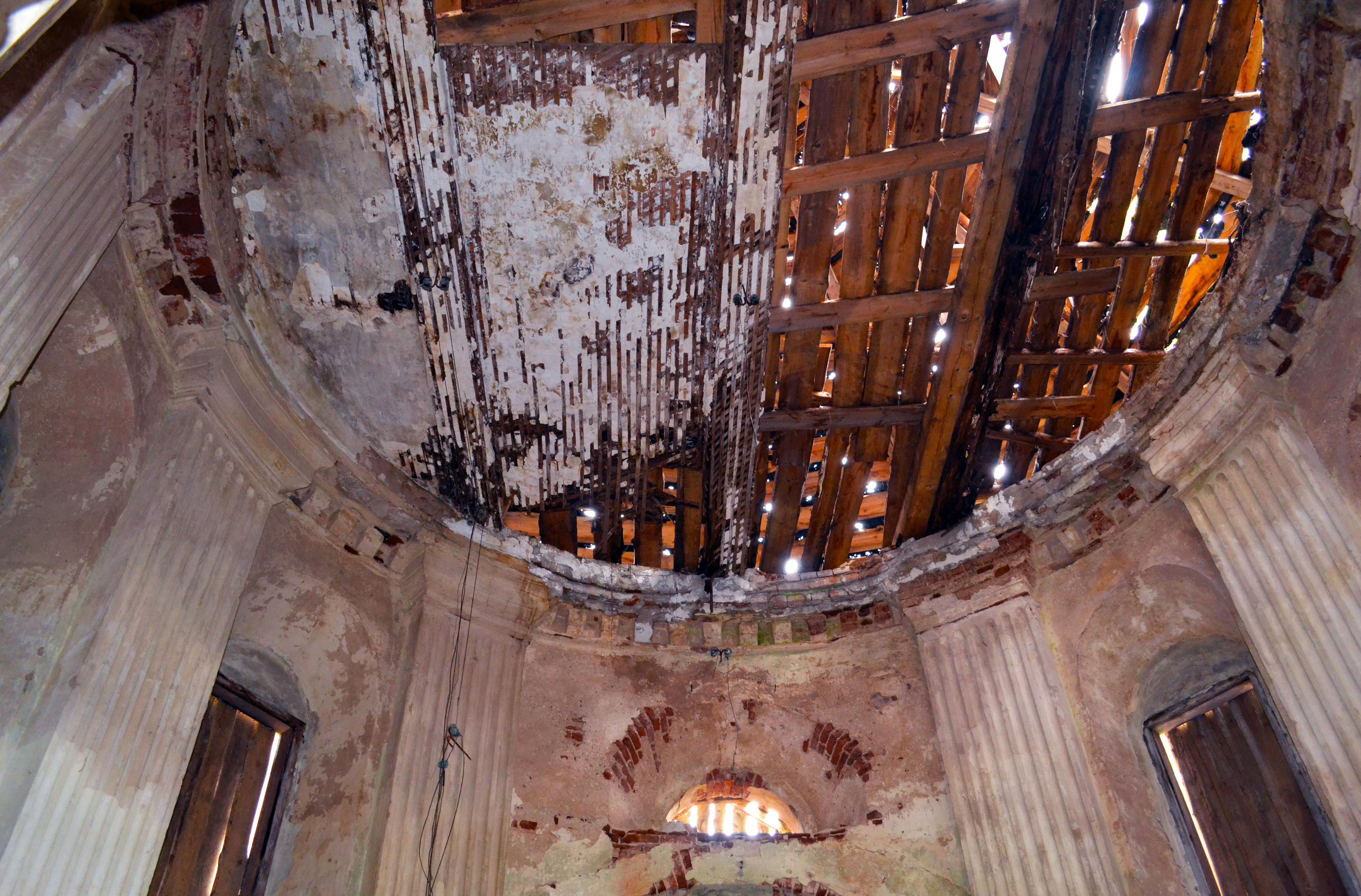 Беларуская (тарашкевіца): Кальвінскі збор, парк на былой сядзібе «Кухцічы» (мяст. Першамайск, Узьдзенскі раён) This is a photo of Belarusian heritage monument. Reference number: 612Г000628 ( WLM)